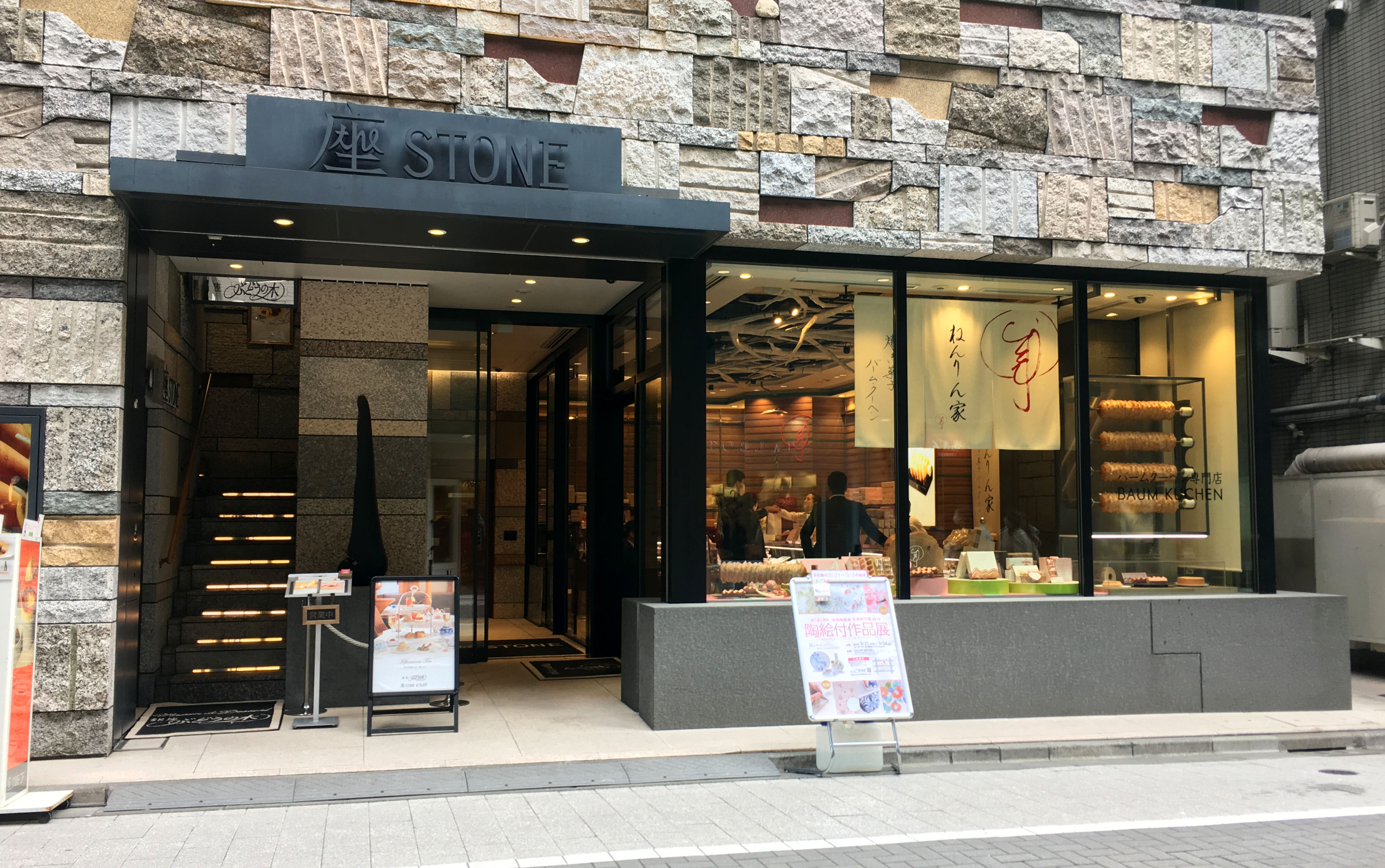 グレープストーン 本社（座STONEビル）